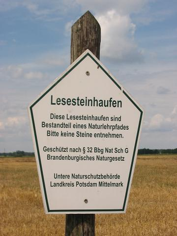 Schild zum Lesesteinhaufen am Naturlehrpfad Netzen, Naturschutzgebiet „Rietzer See“ (sowie Europäisches Vogelschutzgebiet „Rietzer See“ und FFH-Gebiet „Rietzer See“), Gemeinde Kloster Lehnin, Brandenburg.